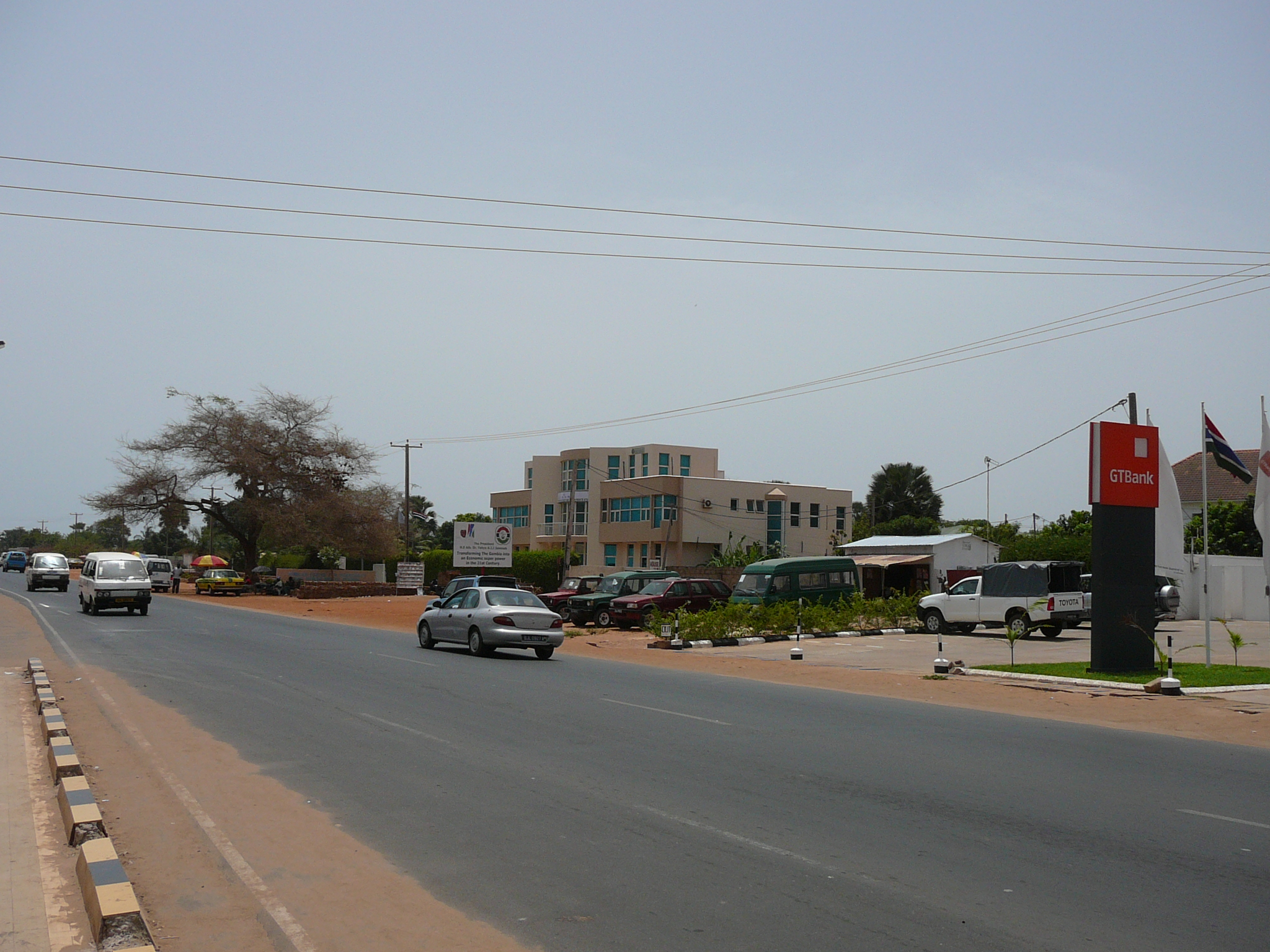 African Centre for Democracy and Human Rights Studies, Ker Serigne, Gambia